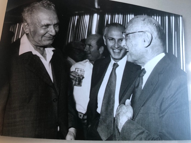 דניאל רקנאטי עם נשיא מדינת ישראל אפרים קציר